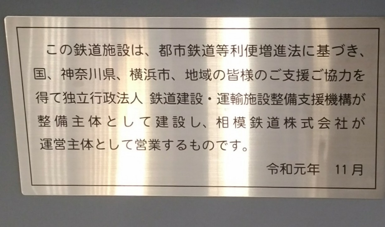 羽沢横浜国大駅に設置されている都市鉄道等利便増進法に基づく鉄道施設の整備に関する銘板。